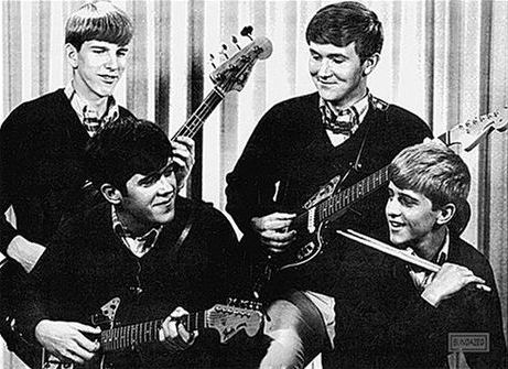 Группа The Gestures